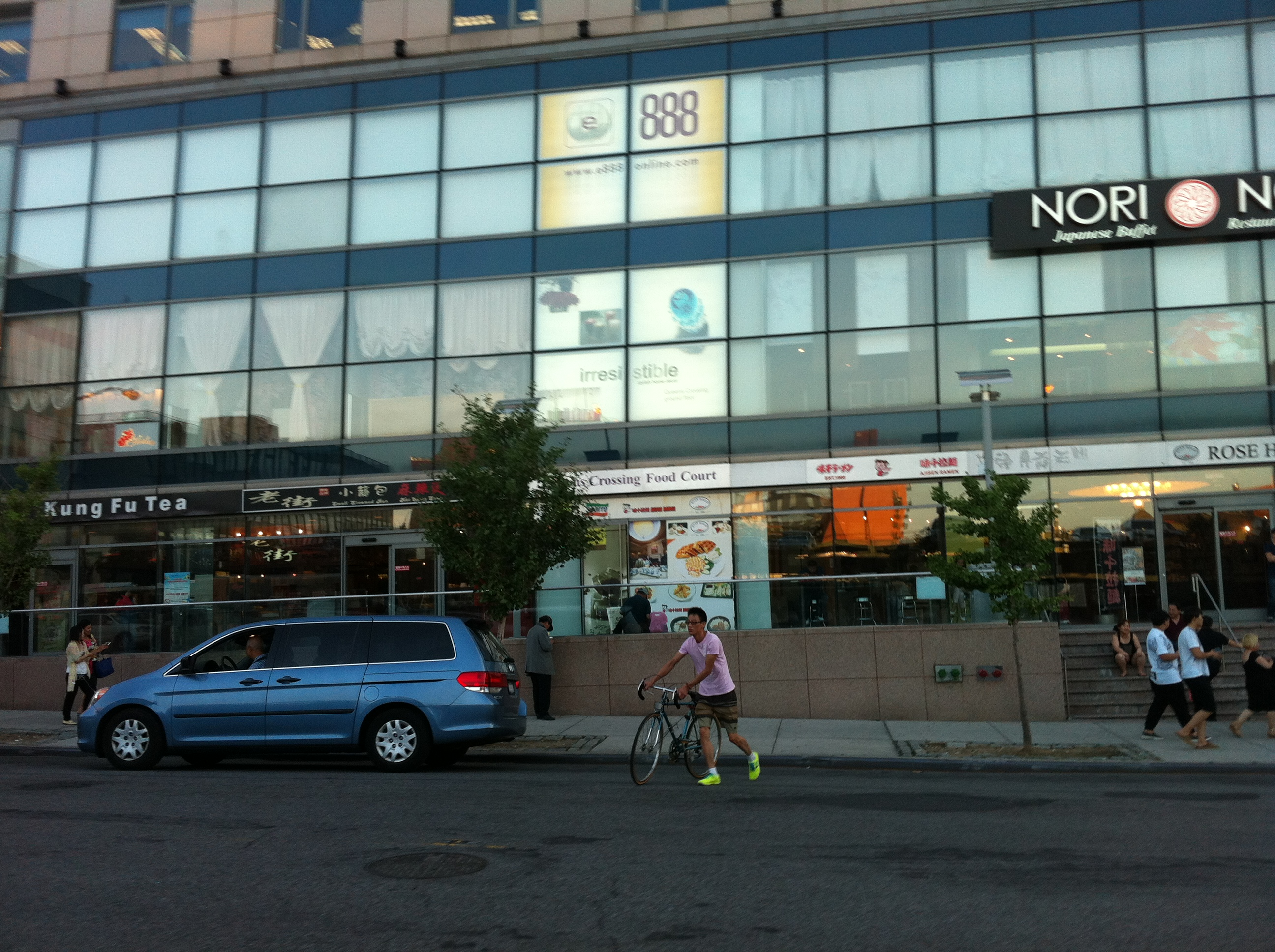 中文（中国大陆）: 纽约法拉盛飞跃皇后购物中心